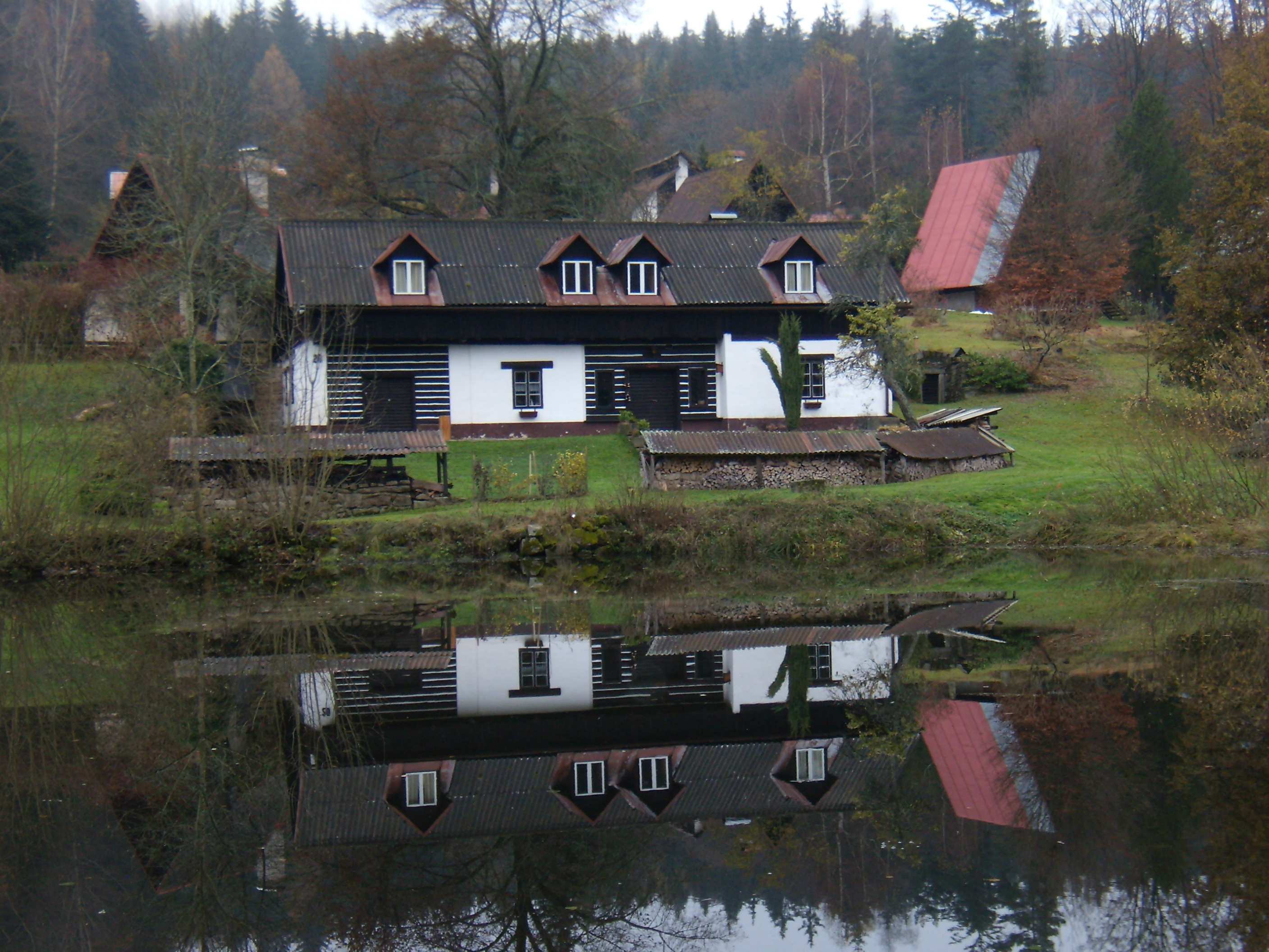 Dolní Hutě